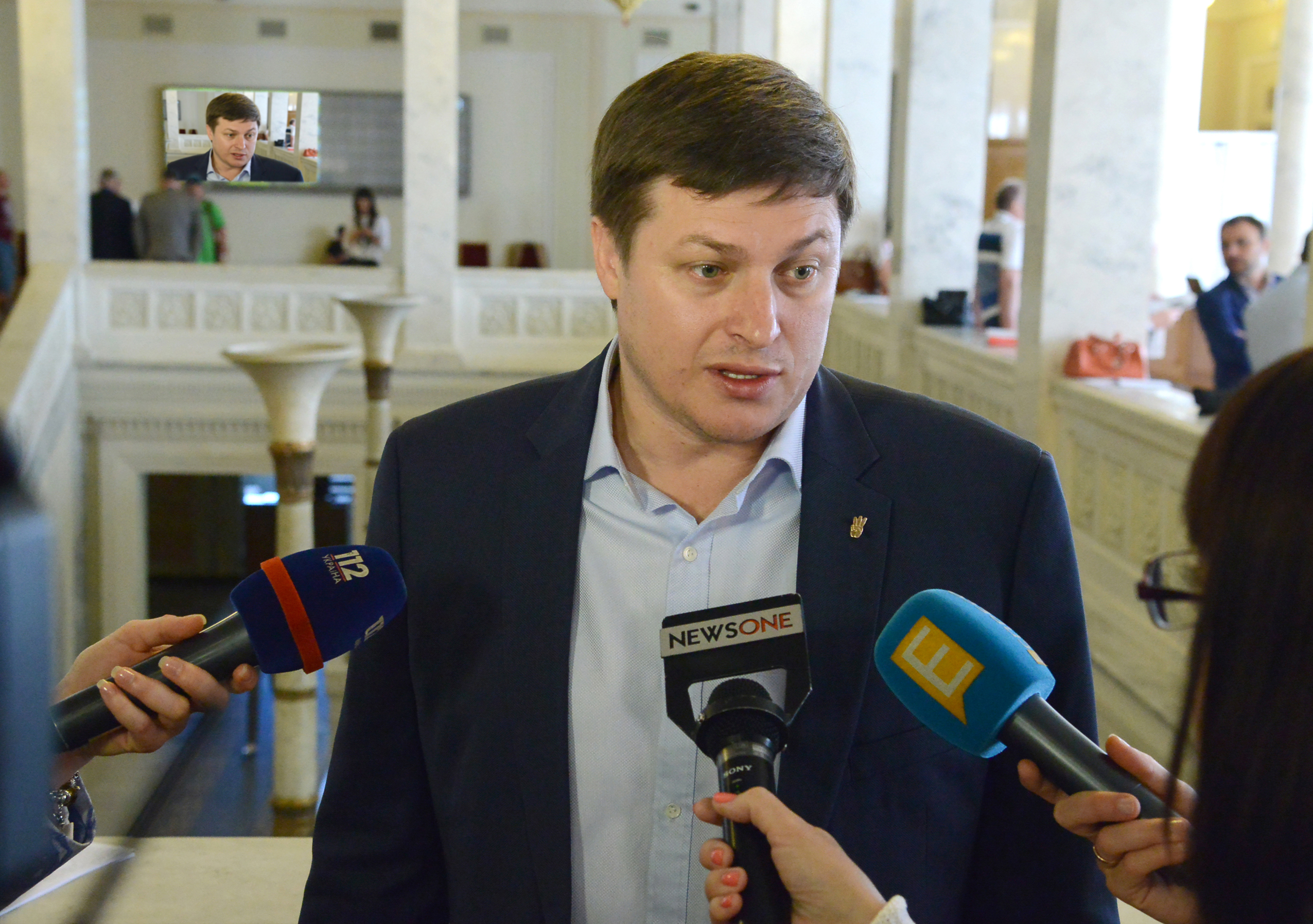 Осуховський Олег Іванович,ВЕРХОВНА РАДА УКРАЇНИ 2016 фотограф Вадим Чуприна